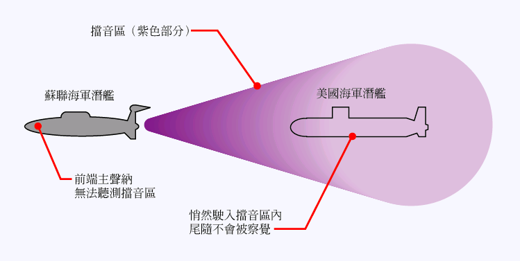 「瘋狂伊凡」條目解說圖1